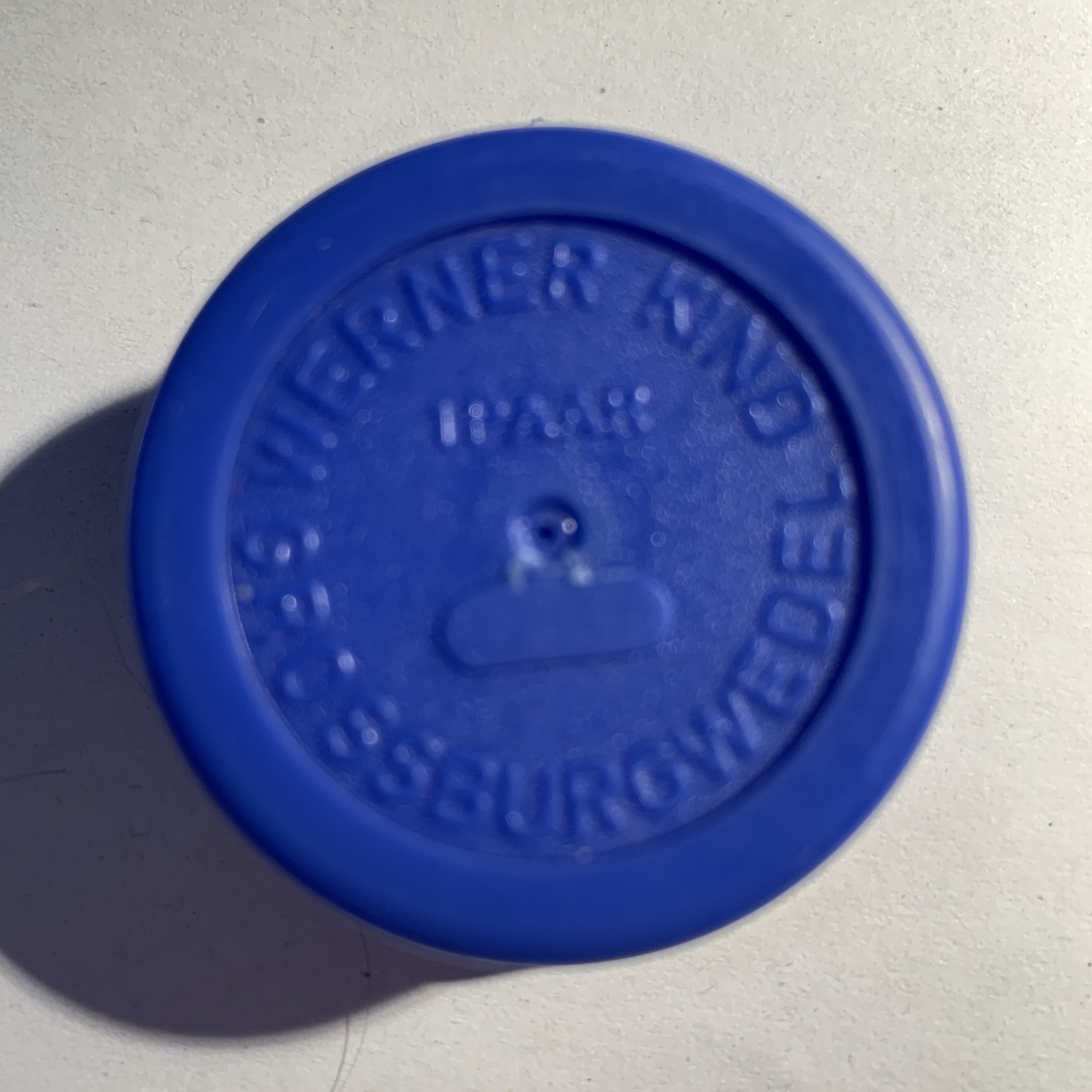 Ohrstöpsel "KIND" 1980er